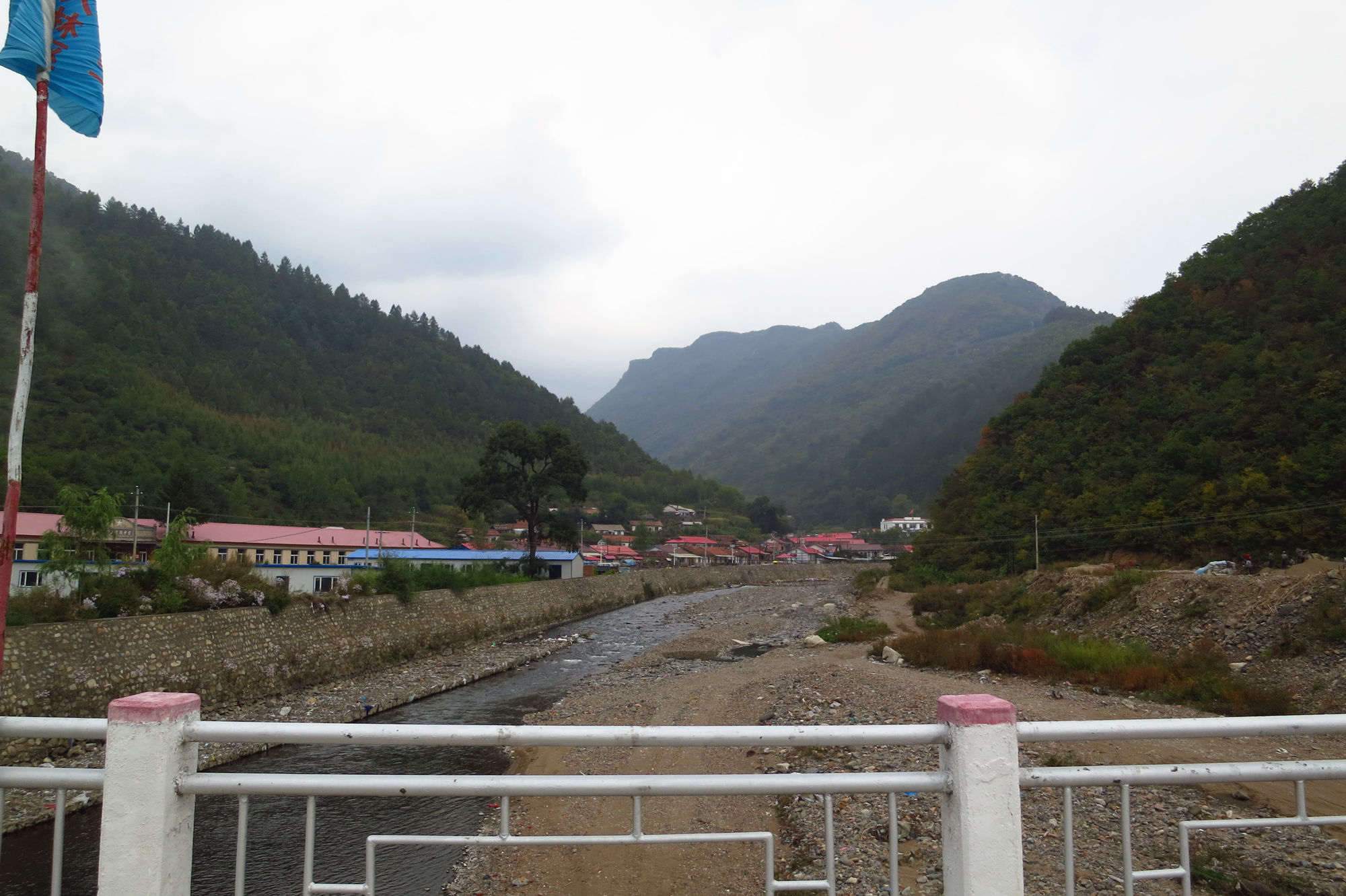 巡道工出品 photo by Xundaogong